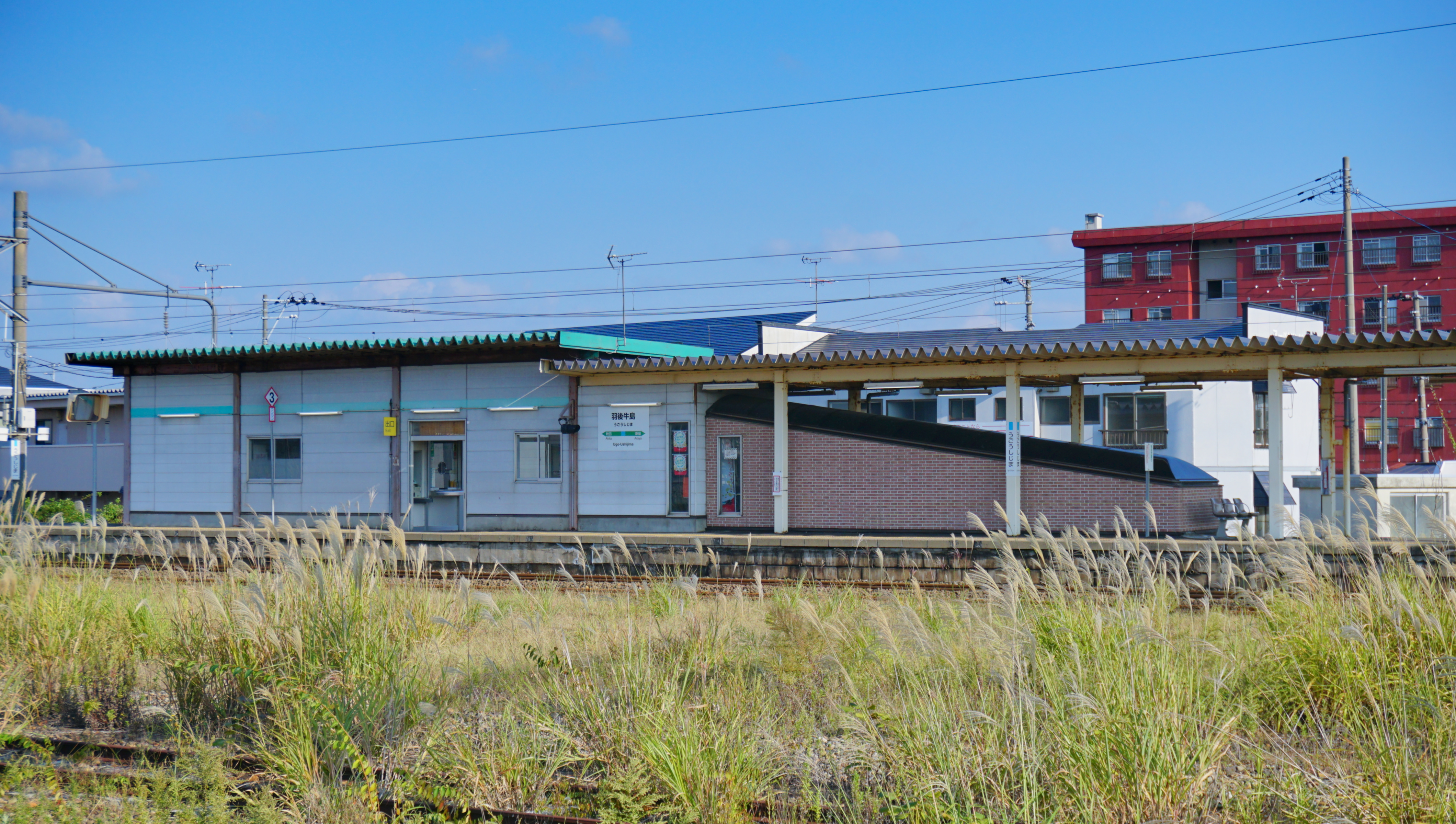 羽越本線 羽後牛島駅（秋田県秋田市）。ホーム上に実際の駅機能が存在する。